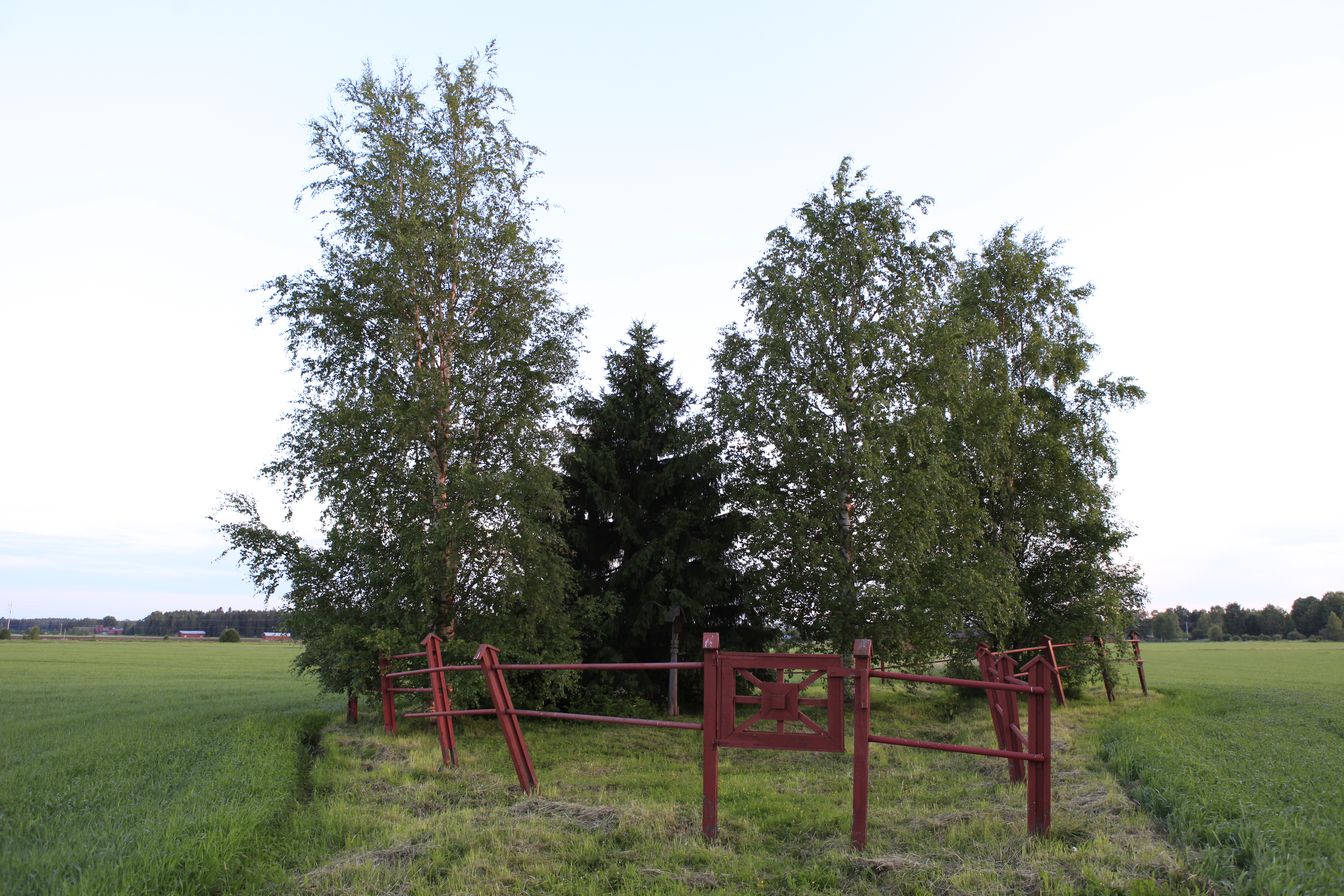 Levänluhdan muinaisjäännökset; rautakautinen vesikalmisto Isokyrössä Pohjanmaalla